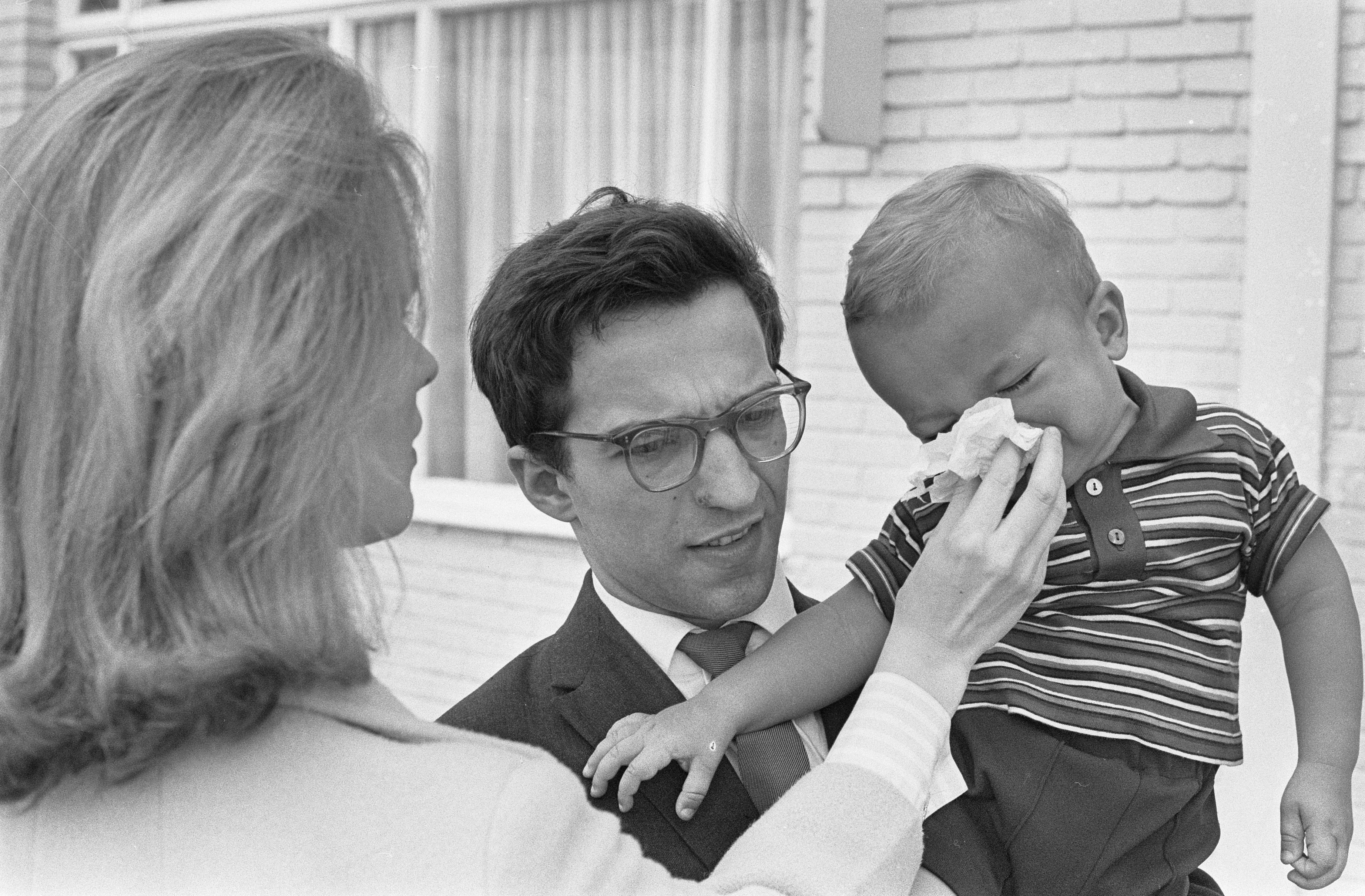 Collectie / Archief : Fotocollectie Anefo Reportage / Serie : [ onbekend ] Beschrijving : Russische Engelse pianist Vladimir Askennazy met vrouw en kind op Schiphol Datum : 23 juli 1963 Trefwoorden : pianisten Fotograaf : Gelderen, Hugo van / Anefo Auteursrechthebbende : Nationaal Archief Materiaalsoort : Negatief (zwart/wit) Nummer archiefinventaris : bekijk toegang 2.24.01.05 Bestanddeelnummer : 915-3756